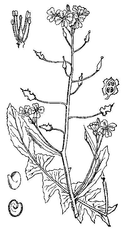 Slika 186. Pikasti lušček. (Búnias Erucágo.)